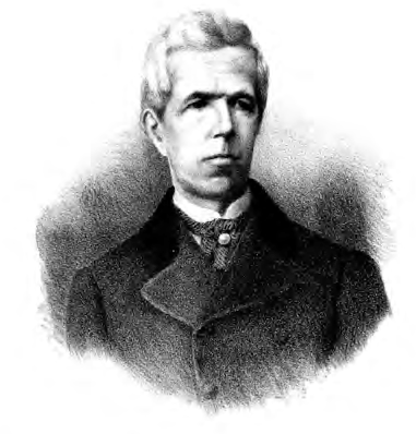 Depicted person: Joaquín Velázquez de León